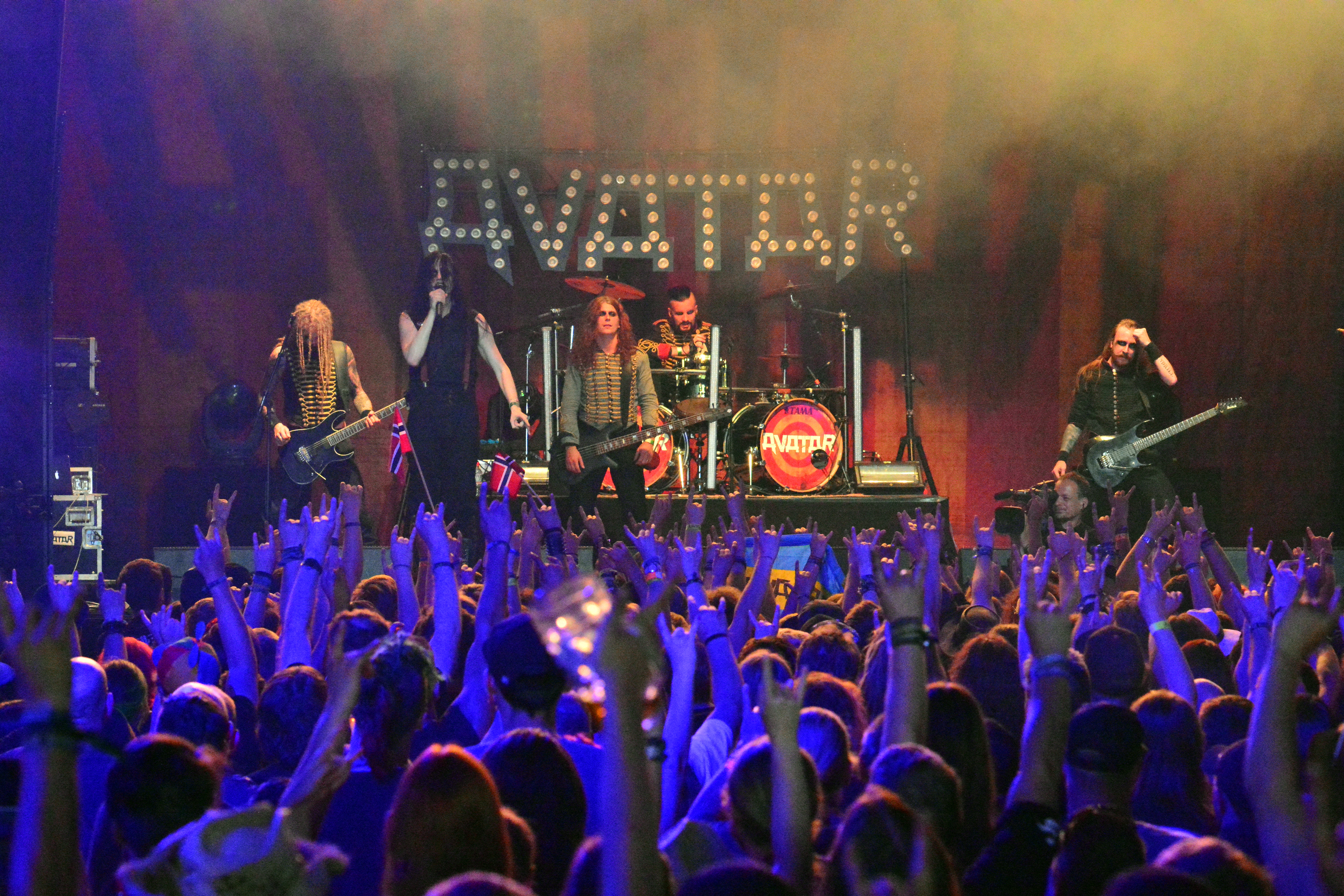 Avatar beim Wacken Open Air 2015